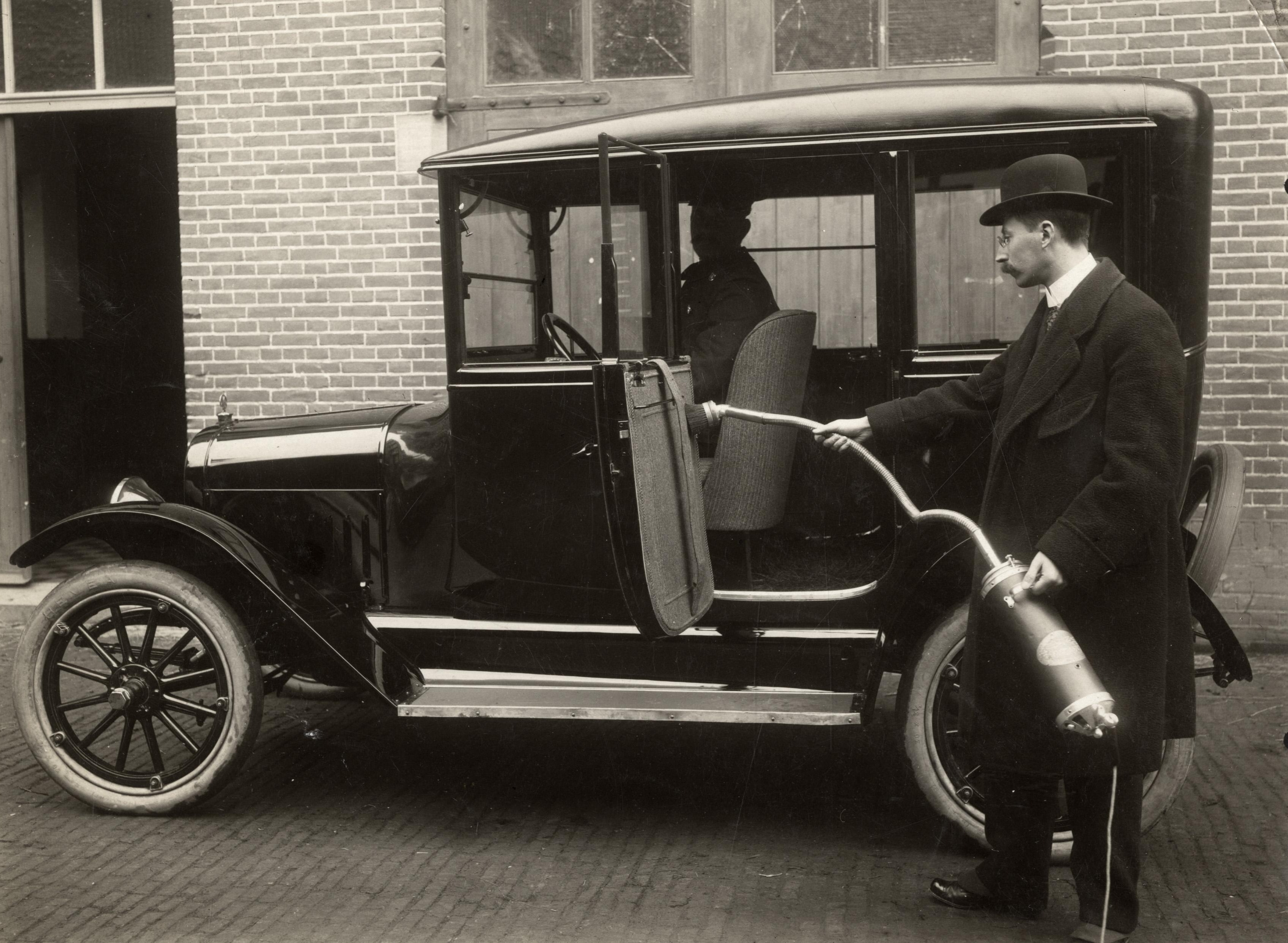 Huishoudelijke apparaten. De Hollandse Elektron-Maatschappij demonstreert een stofzuiger bij een auto, in de stallen van de Amsterdamse Rijtuig-Maatschappij aan de Overtoom in Amsterdam. Nederland, 1916.